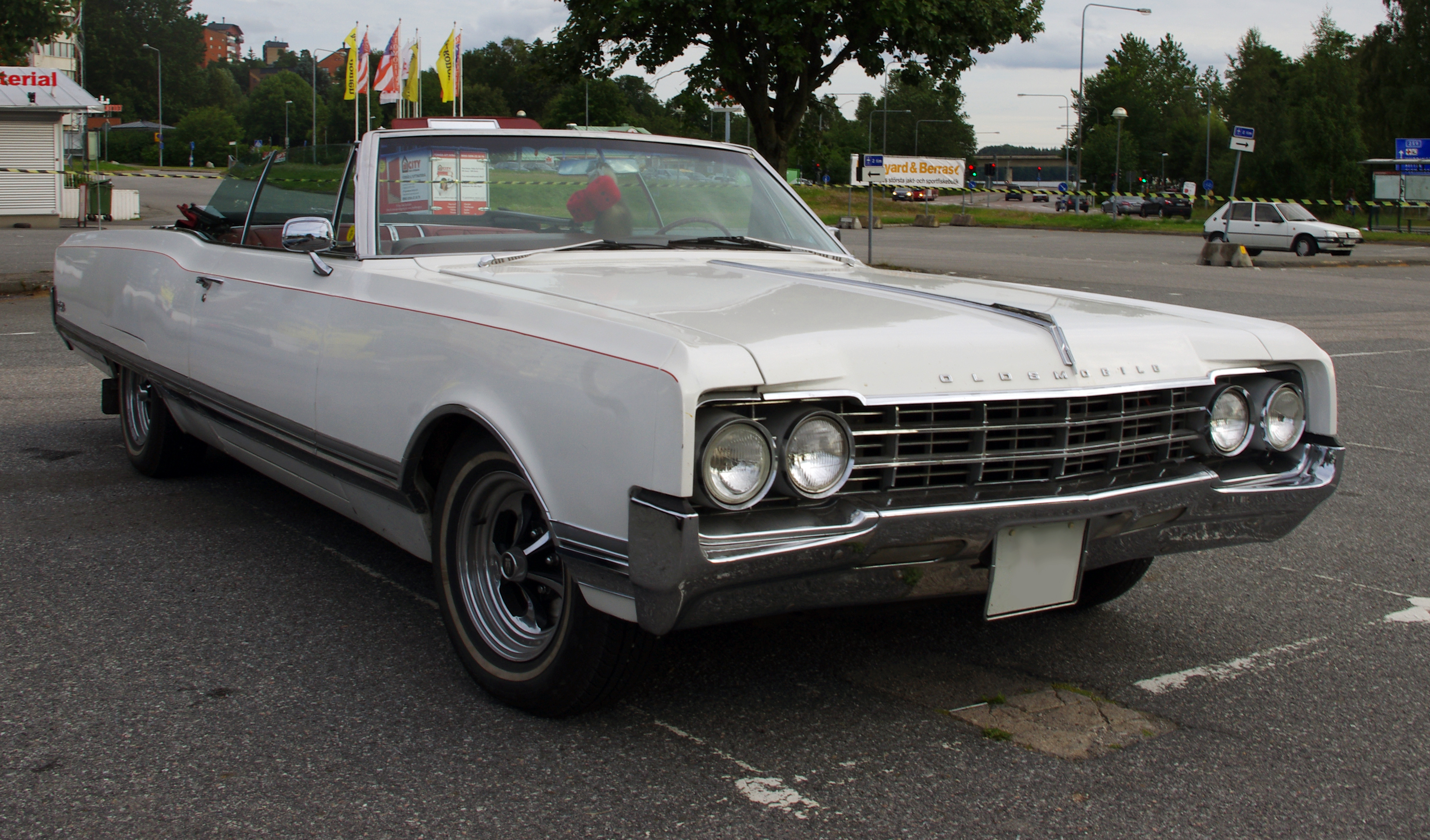 Oldsmobile 98 -65